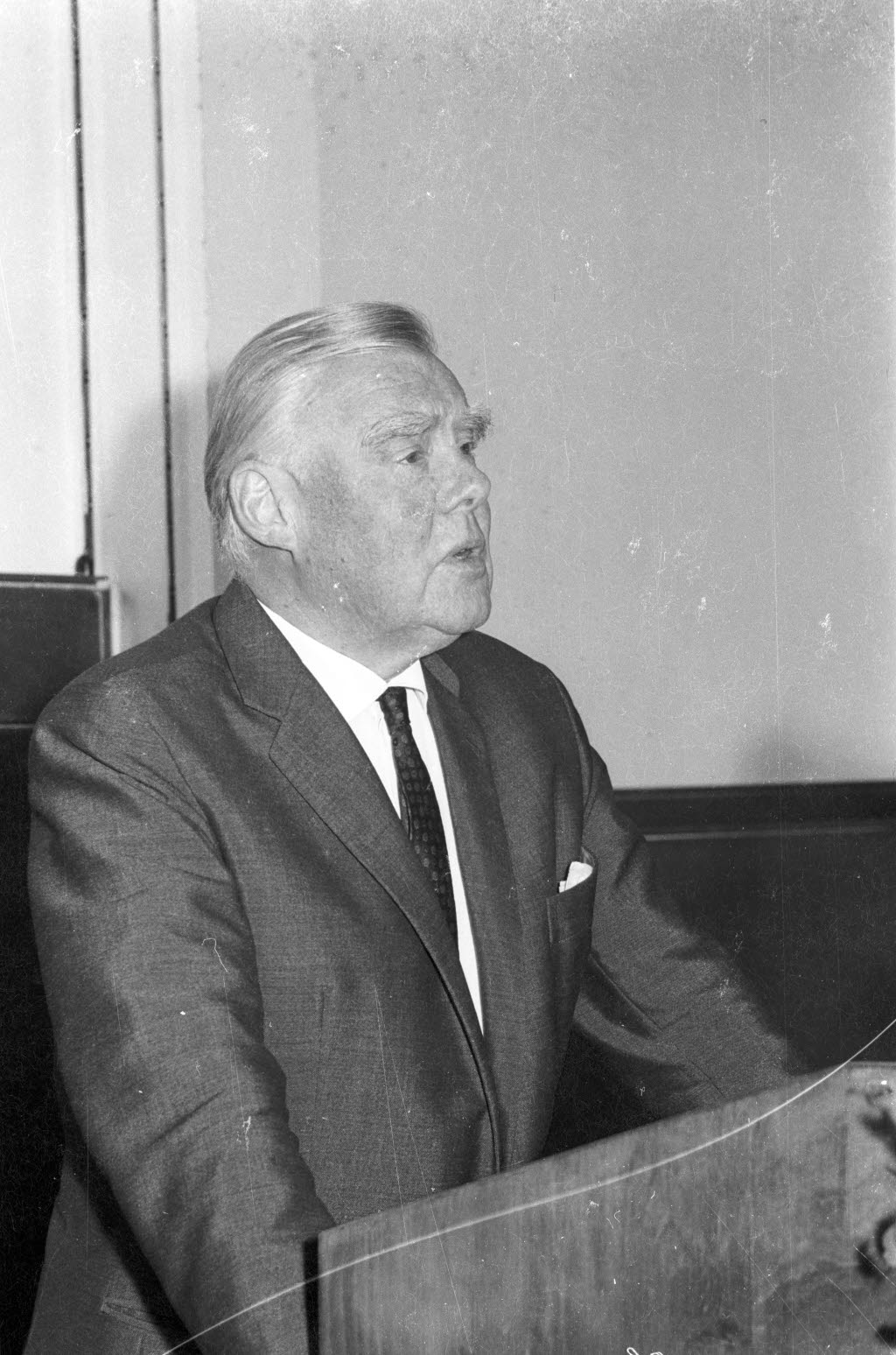 Der Hamburger Psychiater spricht vor der 46. Tagung der Deutschen Gesellschaft für gerichtliche und soziale Medizin in Kiel.